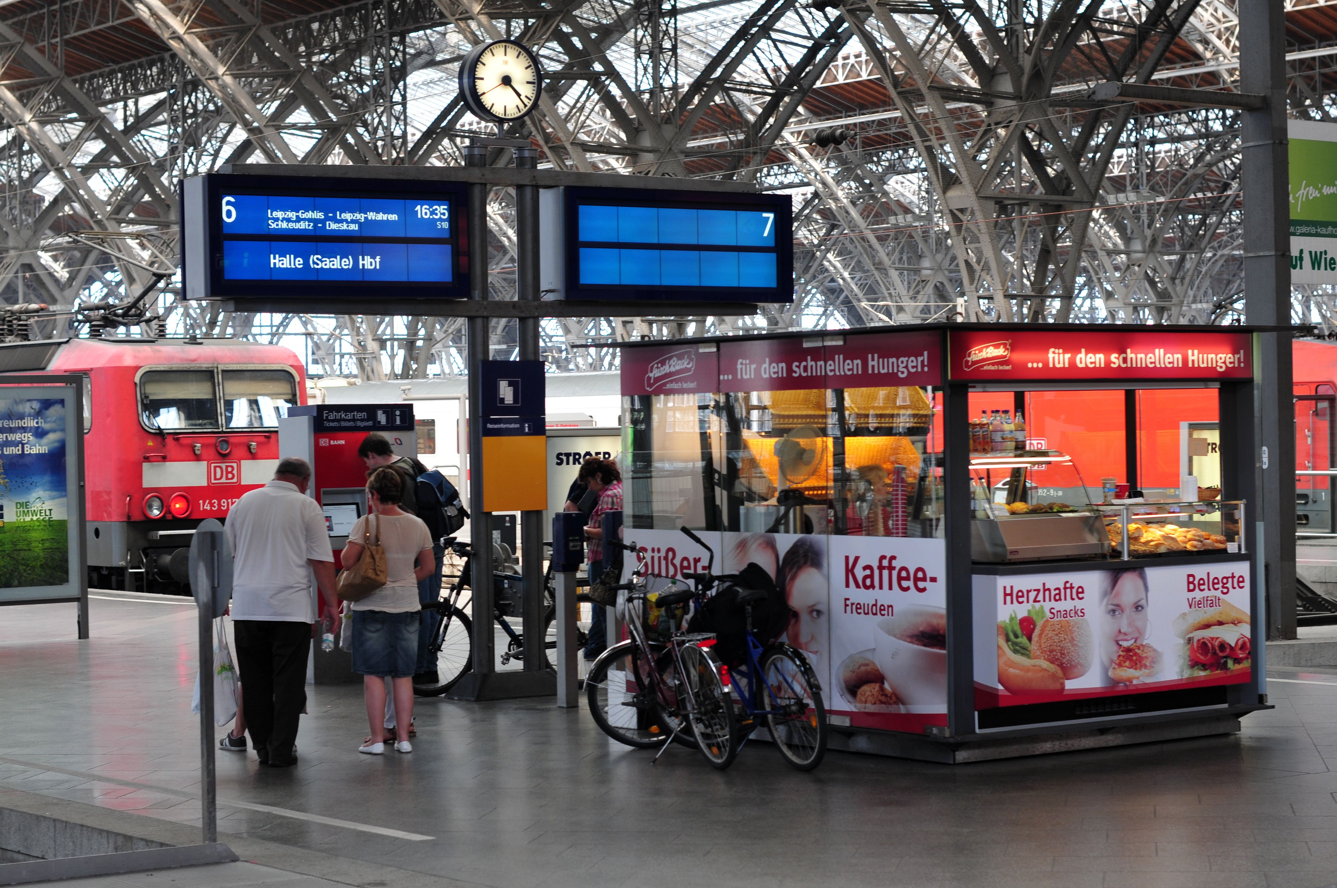 Leipzig, Deutschland